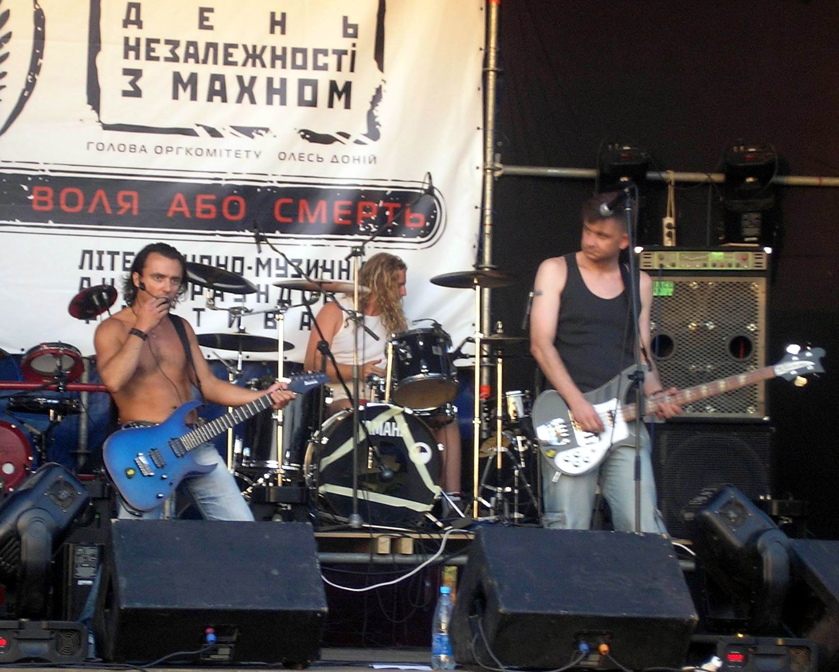 Гурт "Борщ" (Ю.Здоренко, В.Зюбін та О.Піпа) на фестивалі "День Незалежності з Махном" у Гуляйполі, 2007 рік.